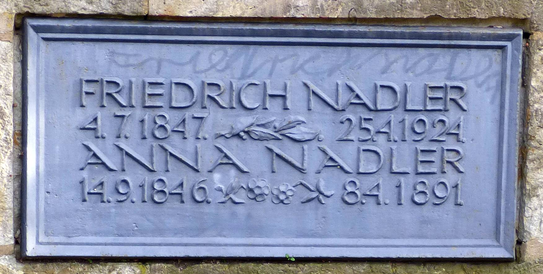 Gedenkplatte für den Pädagogen Friedrich Nadler und seiner Frau Anna am Familiengrab der Familie Nadler im Stadtpark Elsterwerda